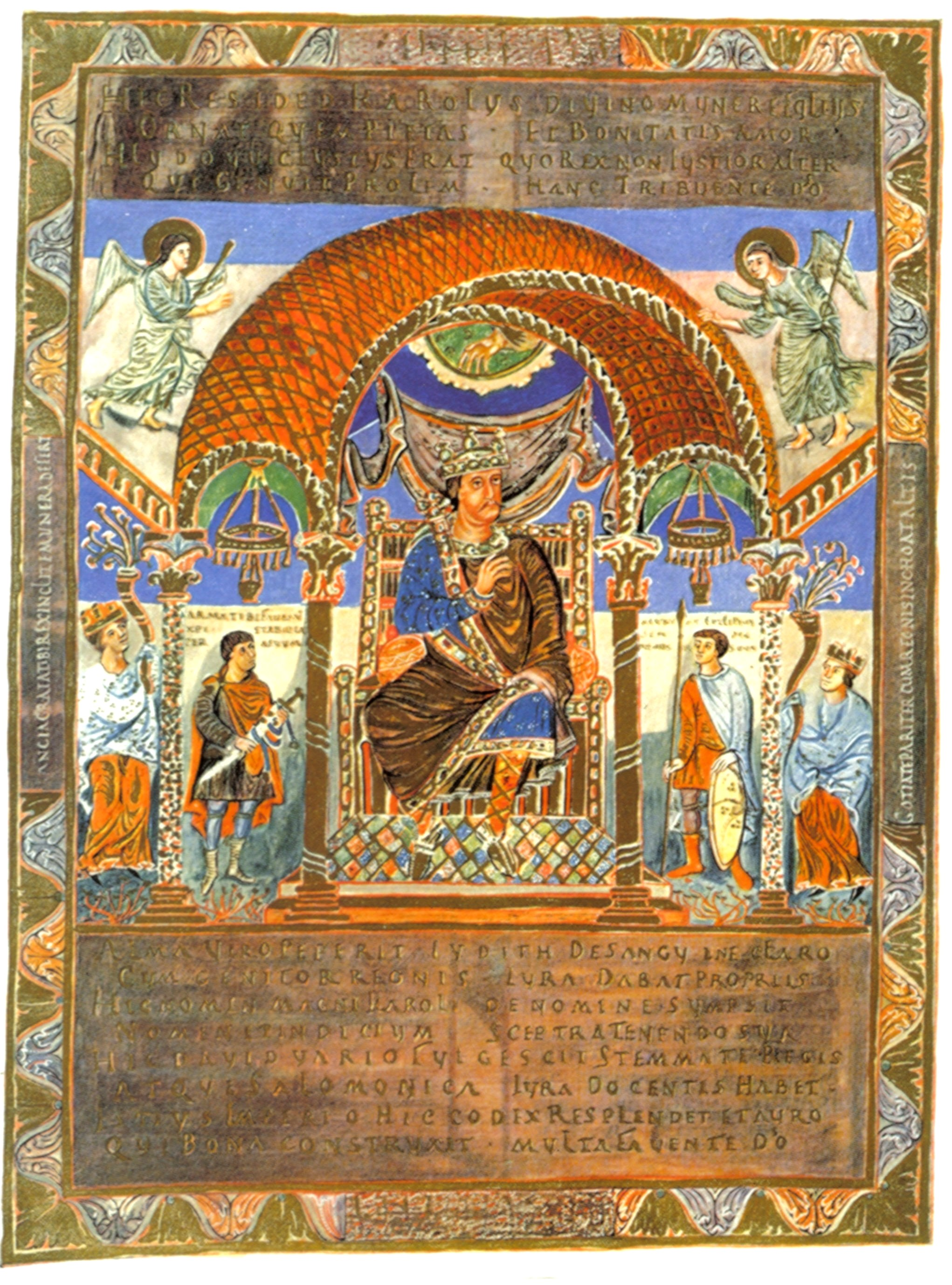 Karl II. der Kahle thront zwischen zwei Waffenträgern und den weiblichen Personifikationen der westfränkischen Reichsteile Francia und Gotia Miniatur Reims um 870, Codex Aureus von St. Emmeram, heute München, Bayerische Staatsbibliothek, Cod. lat. 1400 fol 5v daran angelehnt ist die Darstellung Kaiser Heinrichs II. in seinem Sakramentar, siehe Image:Kronung Heinrich II.jpg